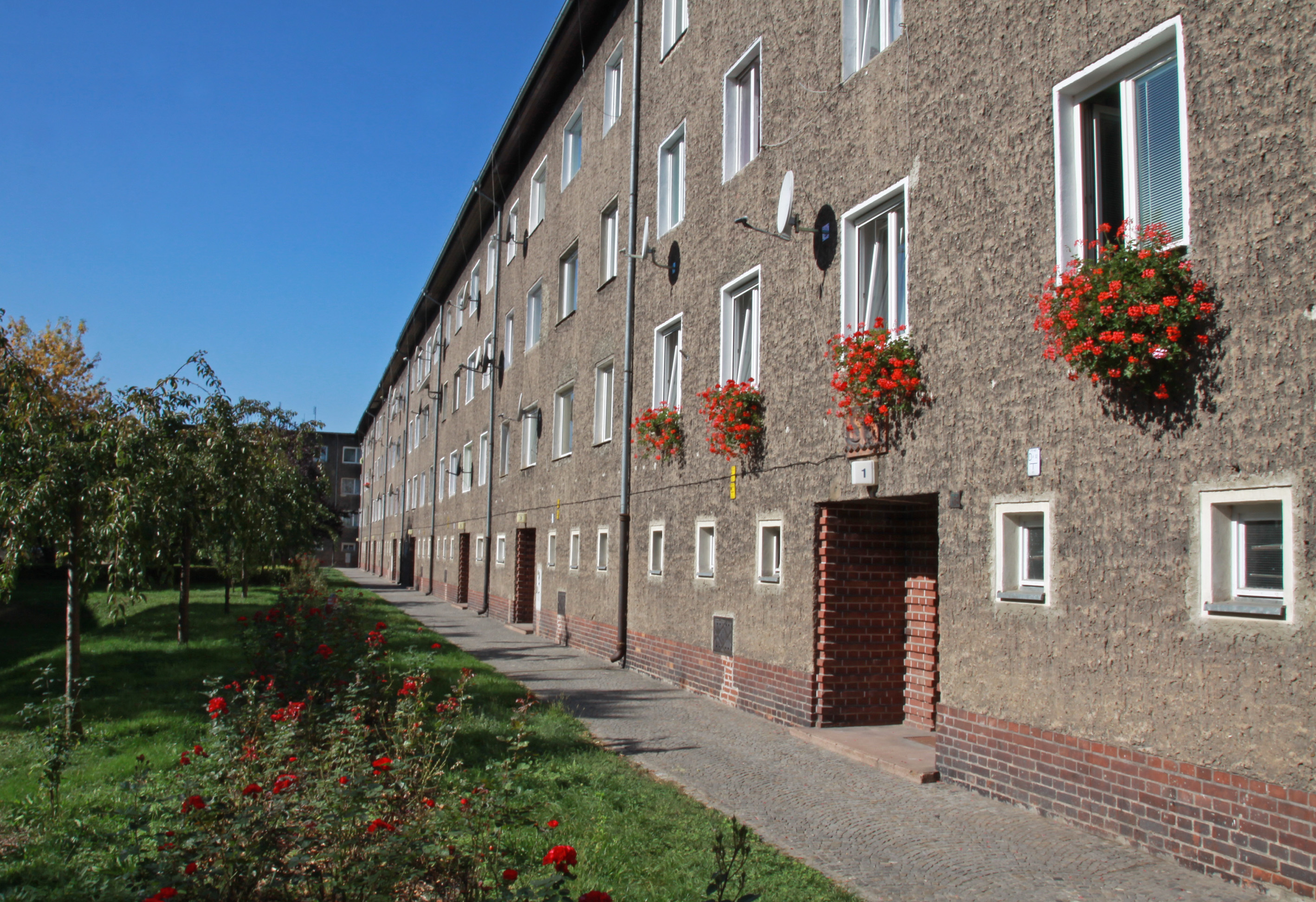 Osiedle Księże Małe - zespół urbanistyczny. W granicach ulic: Katowicka, Bytomska, Chorzowska, Gliwicka, Górnośląska, Tarnogórska , Opolska